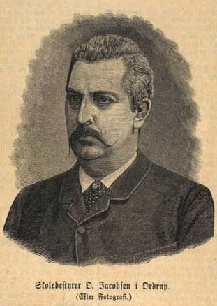 Skolebestyrer Ole Jacobsen, født 1849, død 31.01.1921.